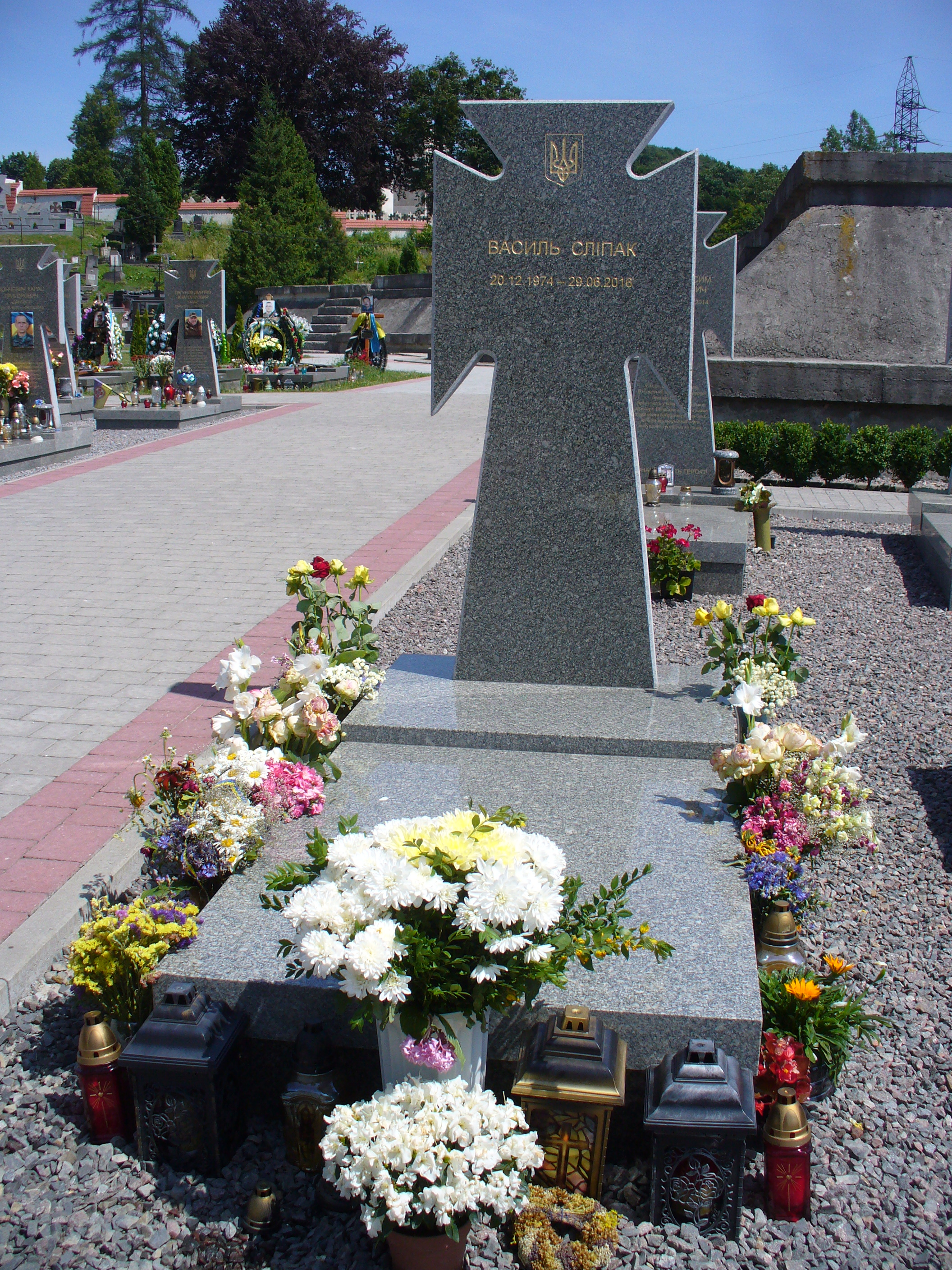 Фото пам'ятника на могилі В.Я.Сліпака